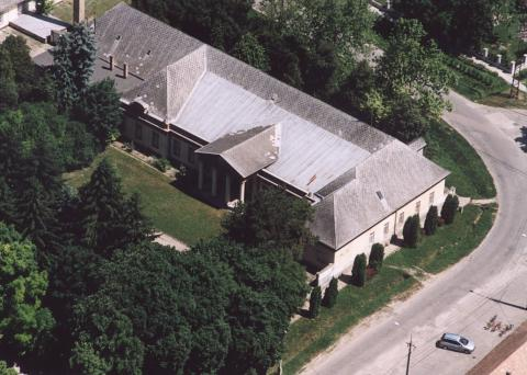 Dunaszentgyörgy, Hungary, aerialphotography